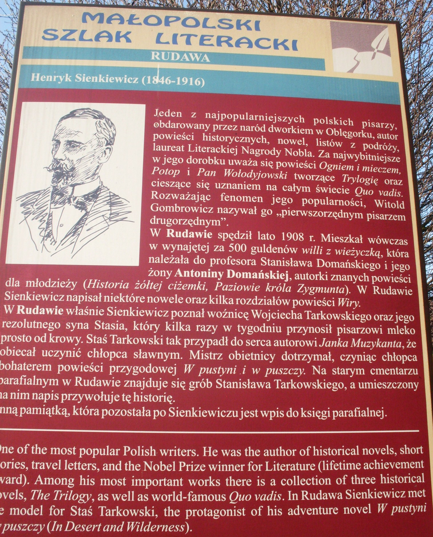 Rudawa. Tablica informacyjna - H. Sienkiewicza